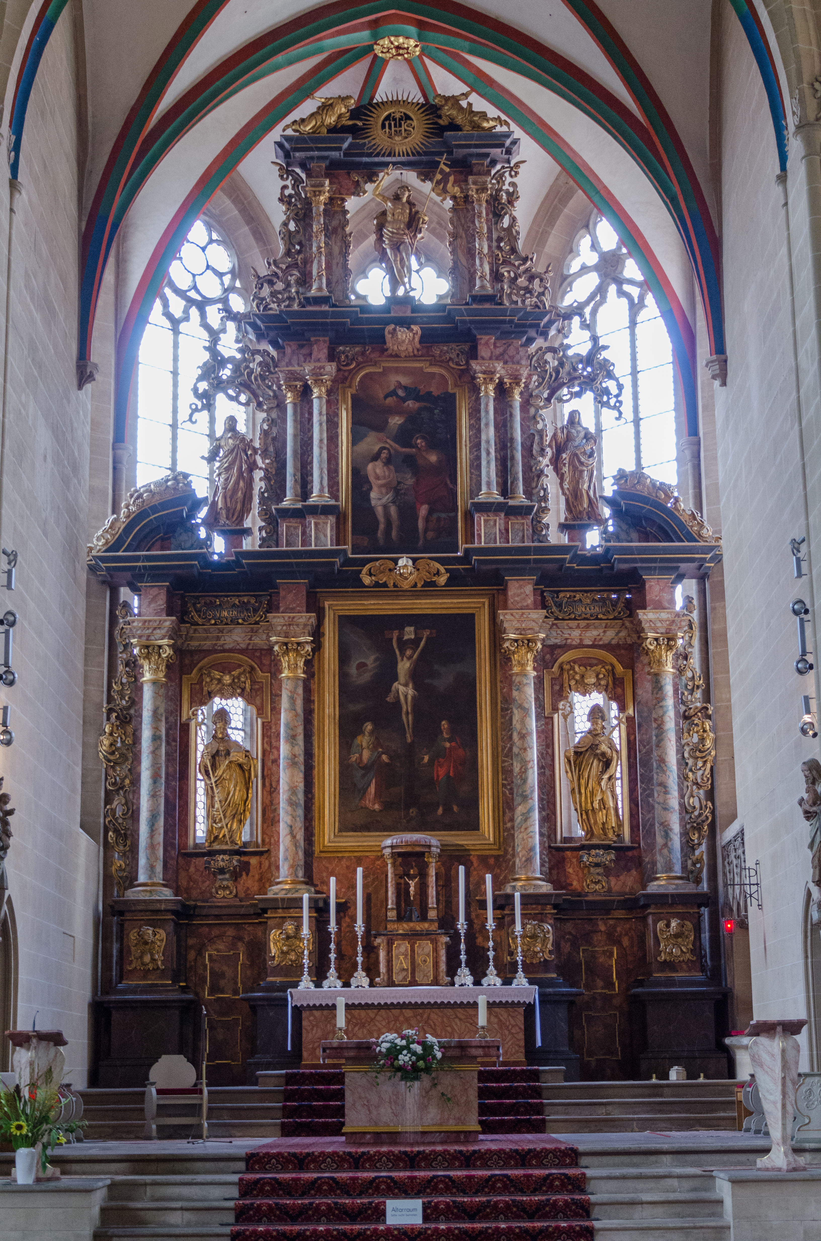 St. Severi Kirche in Erfurt